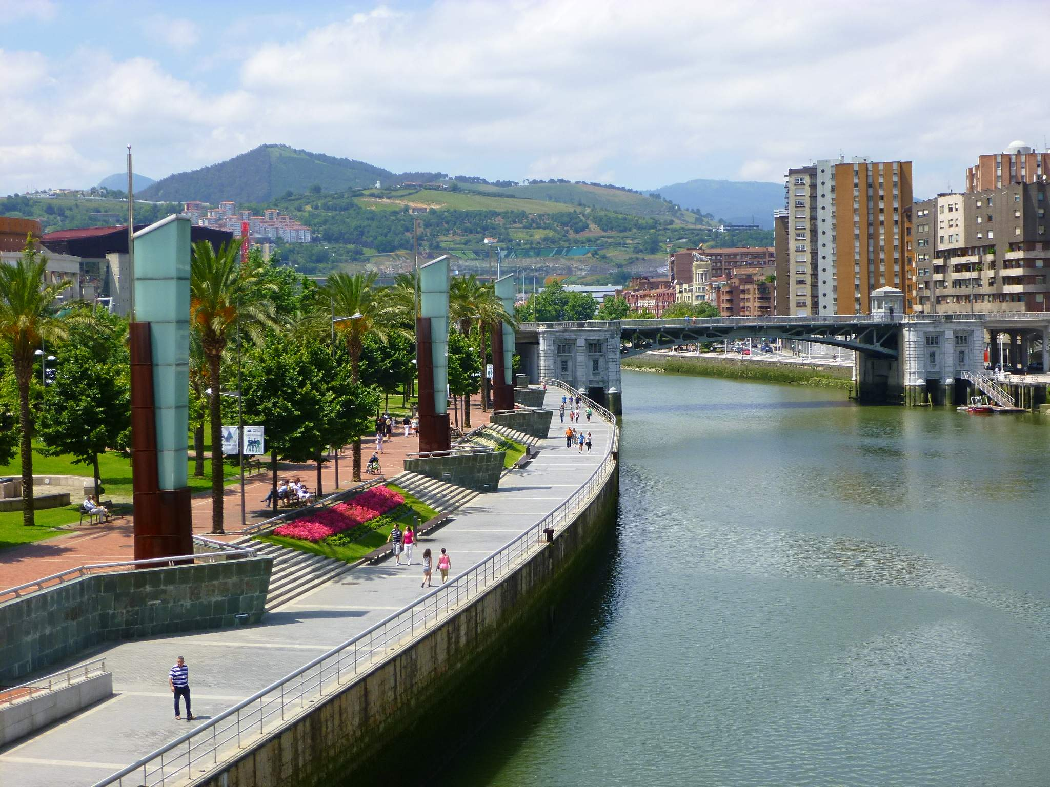 Muelle Evaristo Churruca (Bilbao)